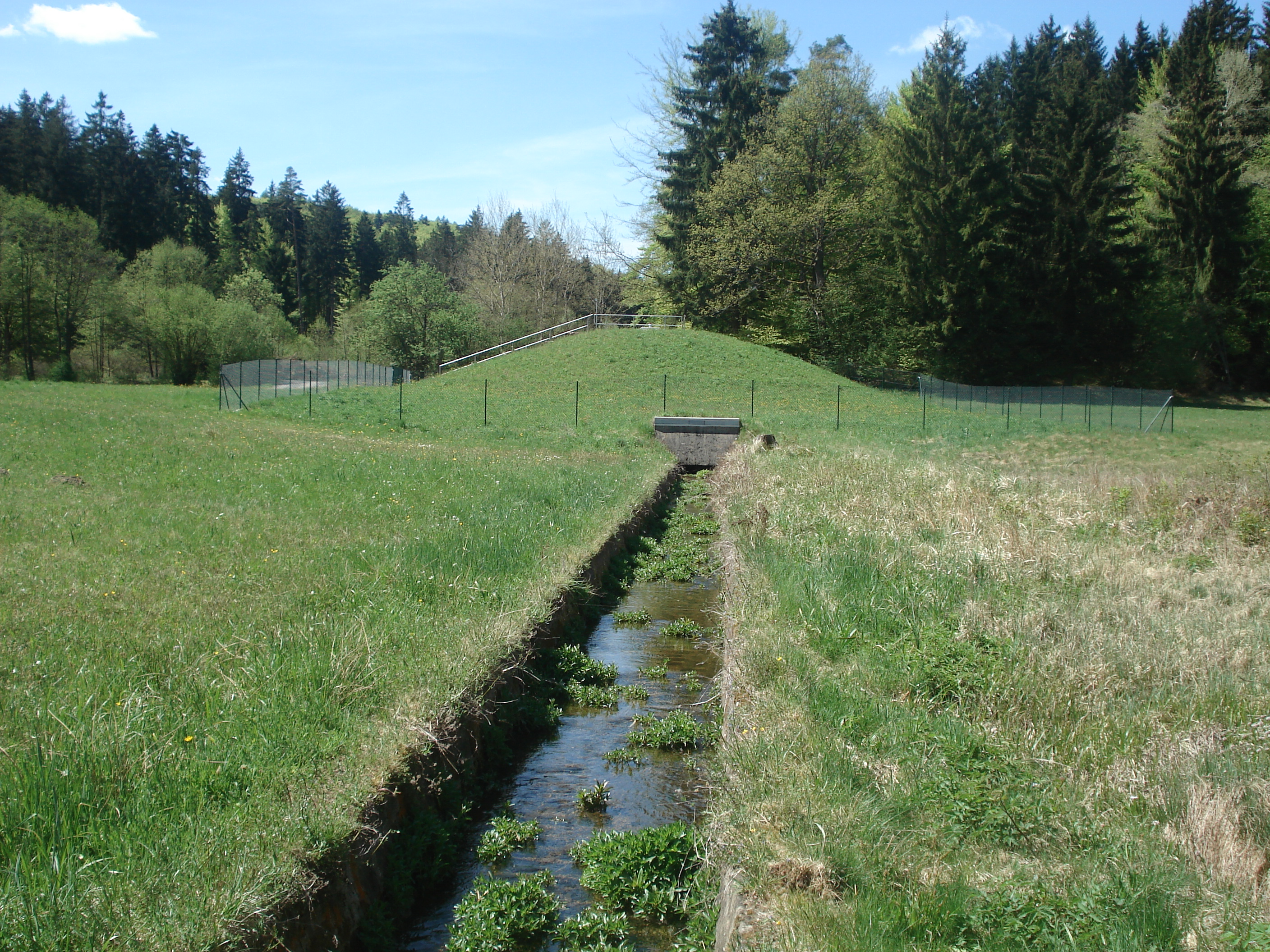 Der Weihersbrunnen, die Quelle des Weihersbaches